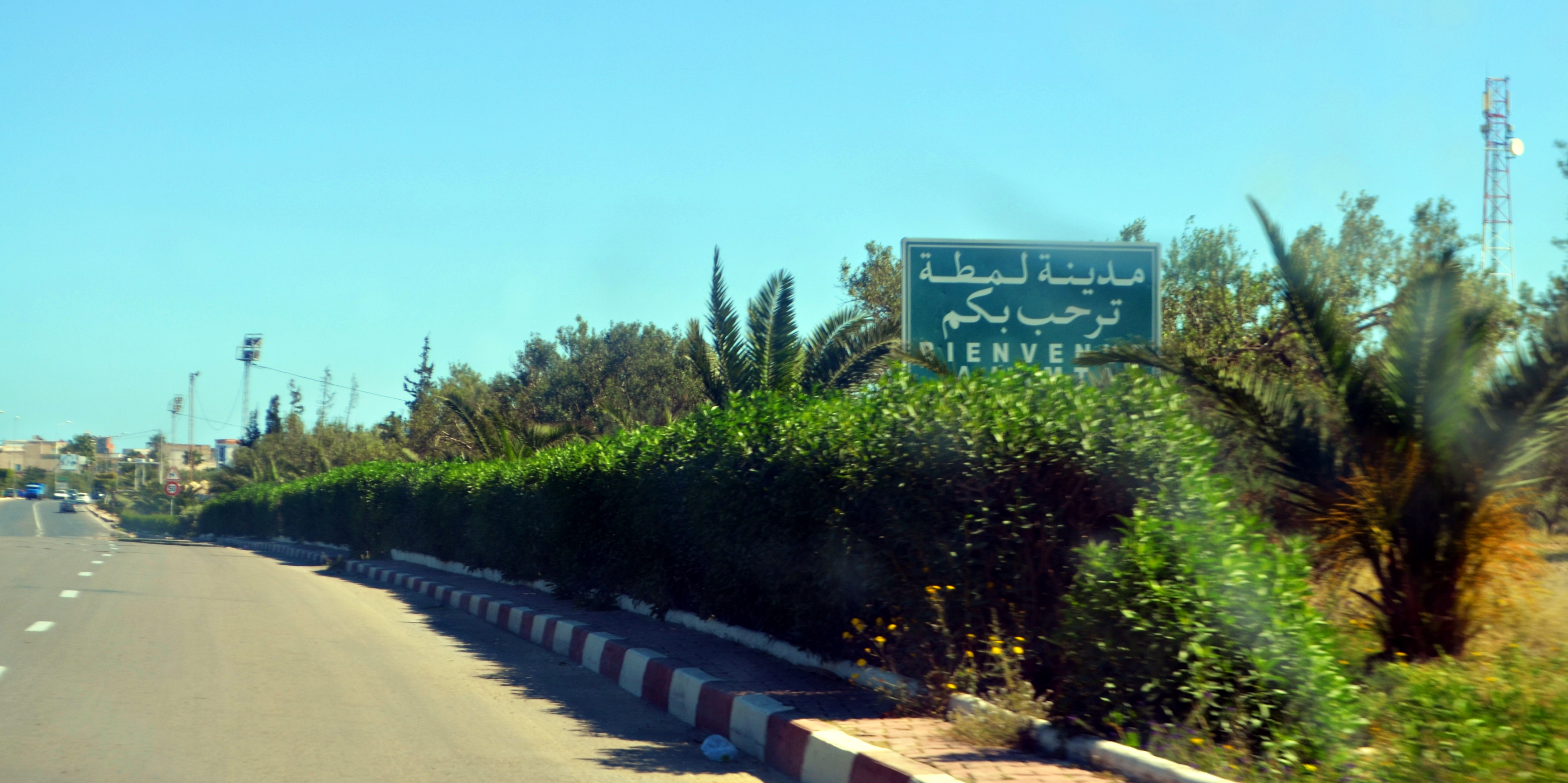 مدخل مدينة لمطة، تونس.